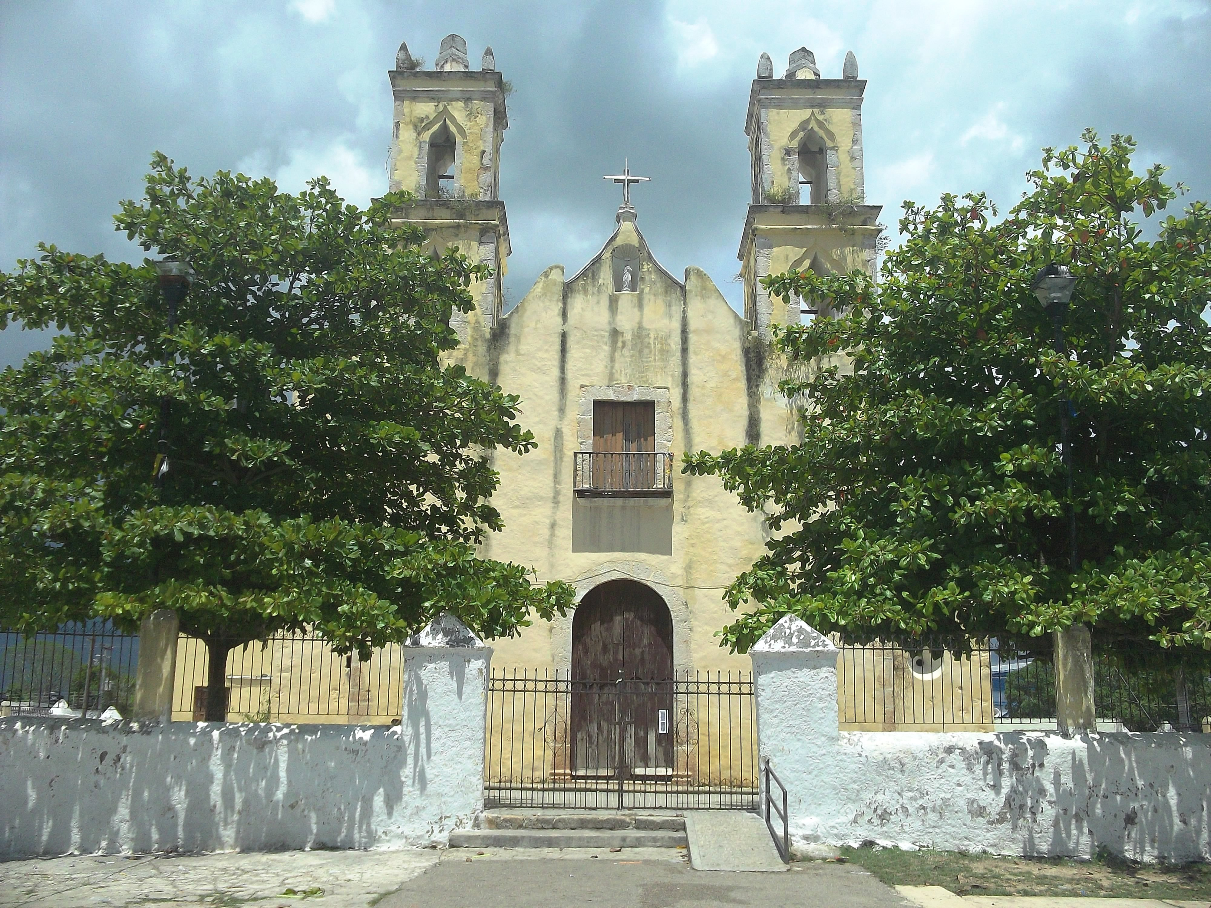 Iglesia principal de Seyé, Yucatán.